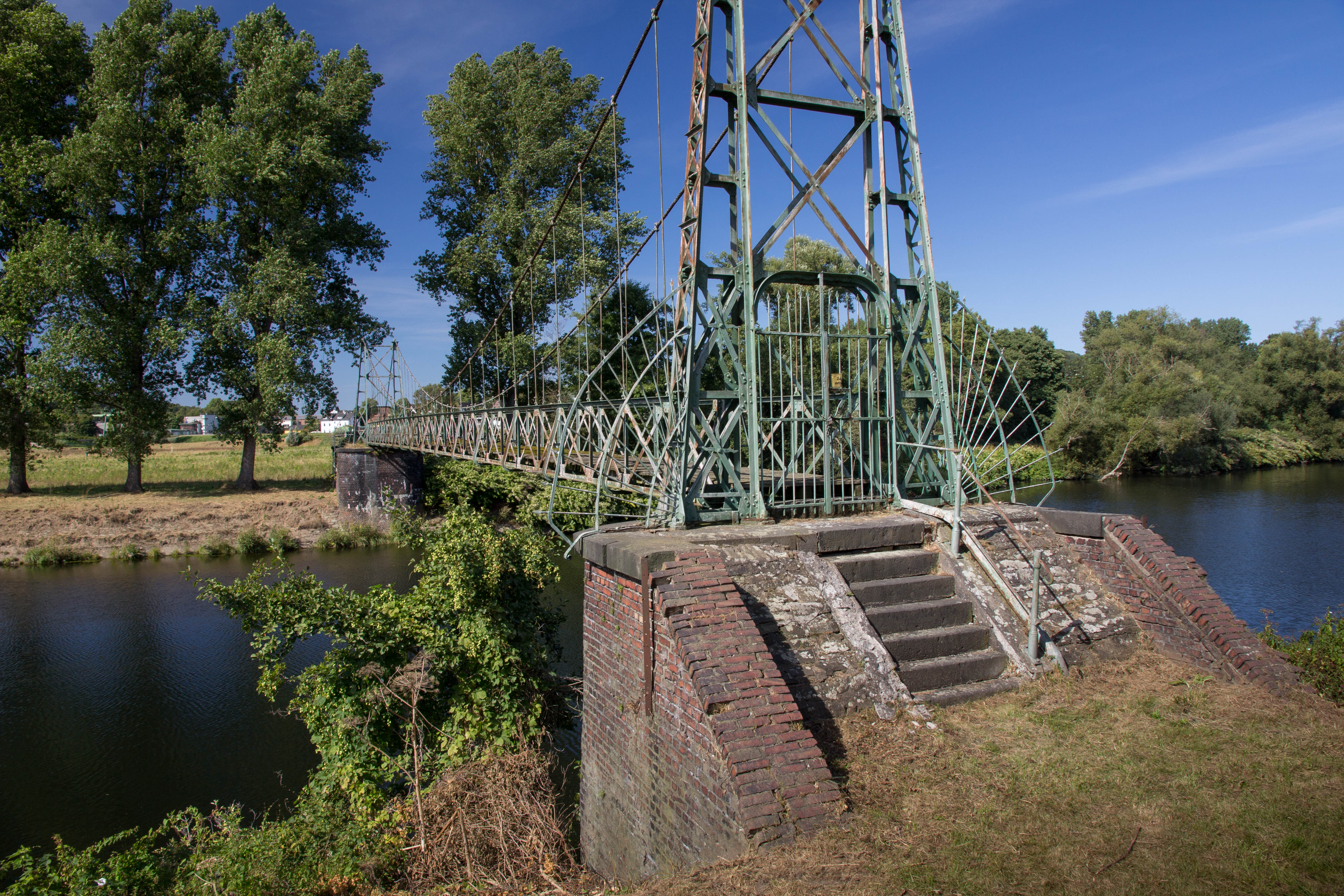 Im Jahr 1990 stellt eine gutachterliche Untersuchung fest, dass die Brücke nicht mehr standsicher ist. Daher wird sie beidseitig durch Gitterkonstruktionen gegen Betreten gesichert.This is a photograph of an architectural monument.